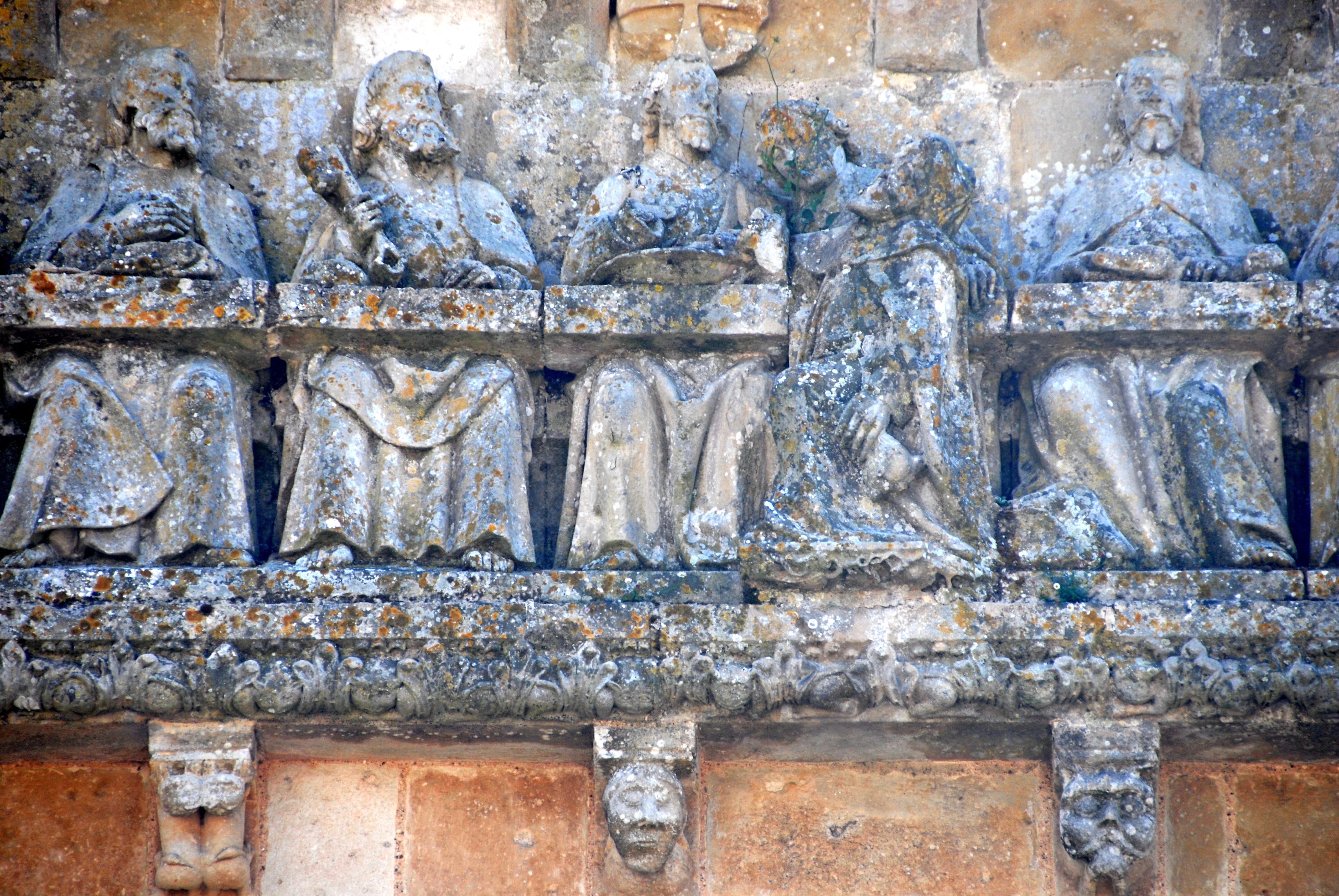 Vouvant, Abendmahl, Detail Mitte